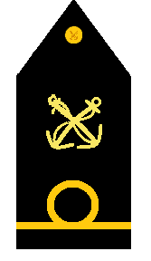 Capona de Guardiamaria de la Armada Bolivariana de Venezuela